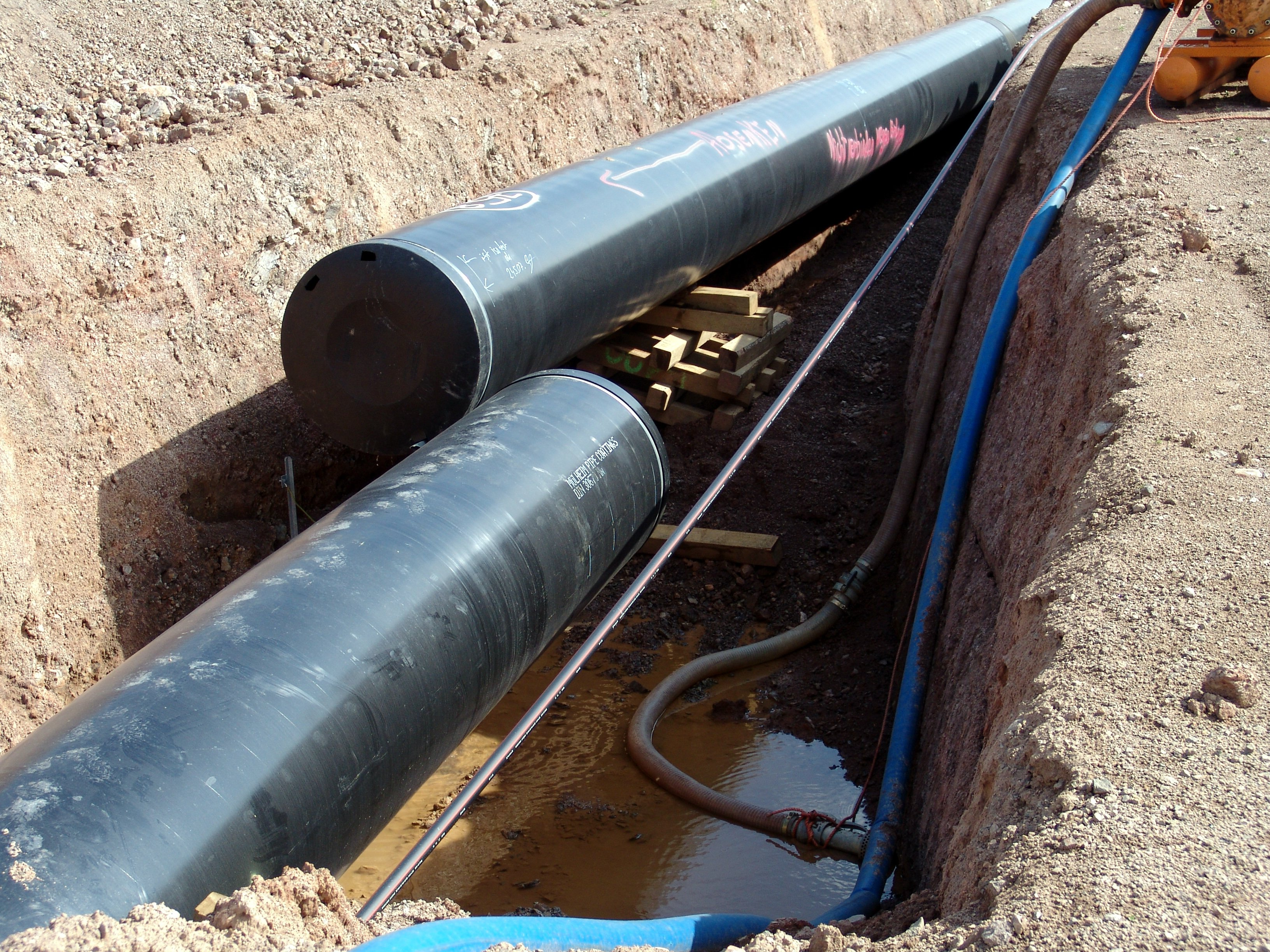 Pipeline im Bau